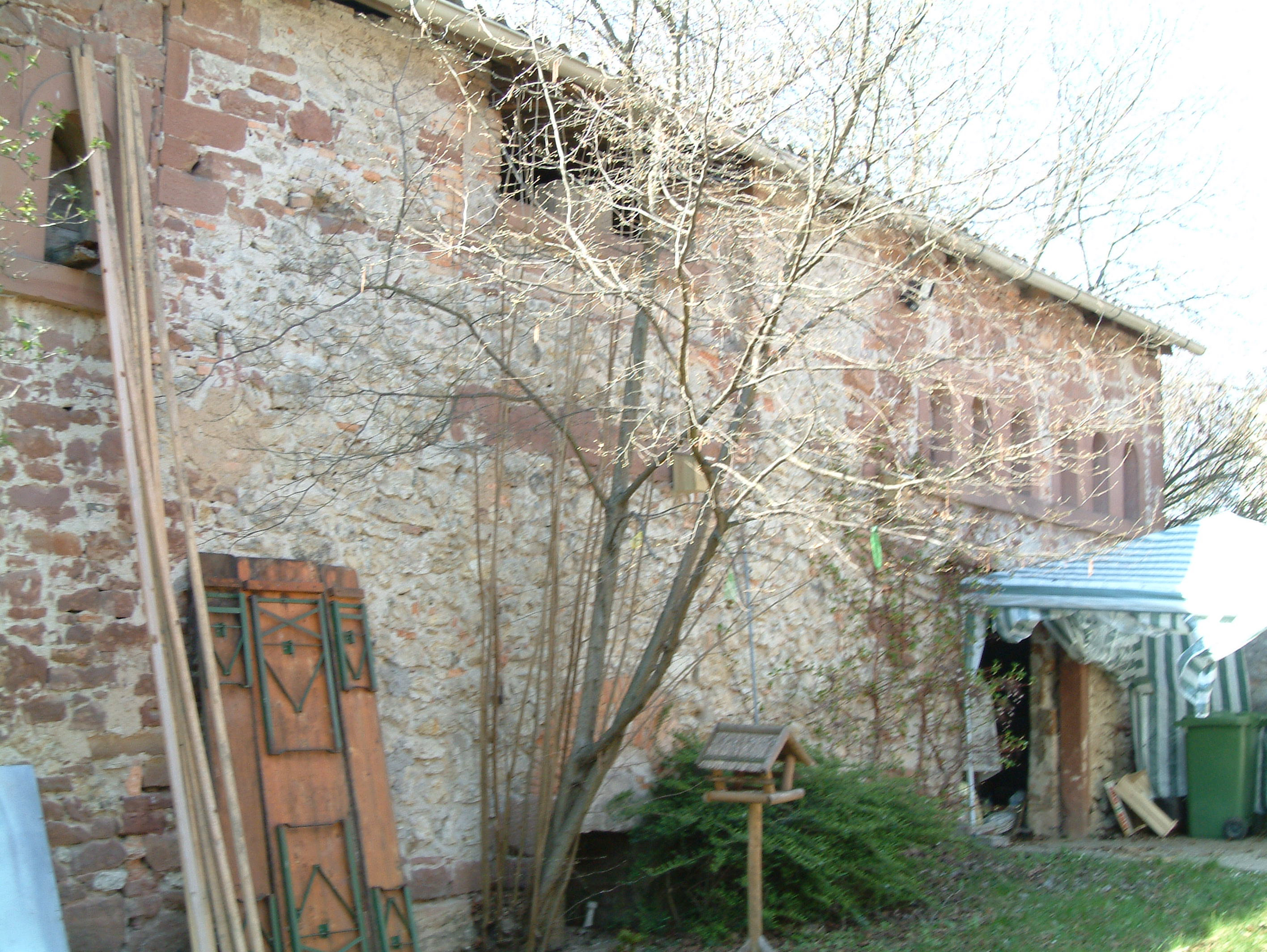 Ziegelhütte, Obertor 11 zu Dirmstein